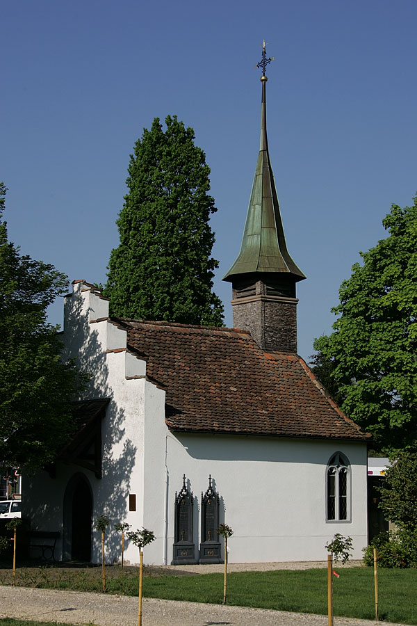 Friedhofskapelle in Kaiserstuhl